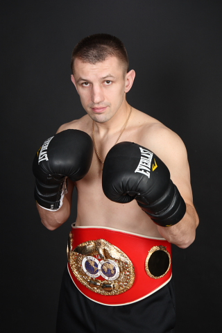 Tomasz Adamek - polski bokser, mistrz świata